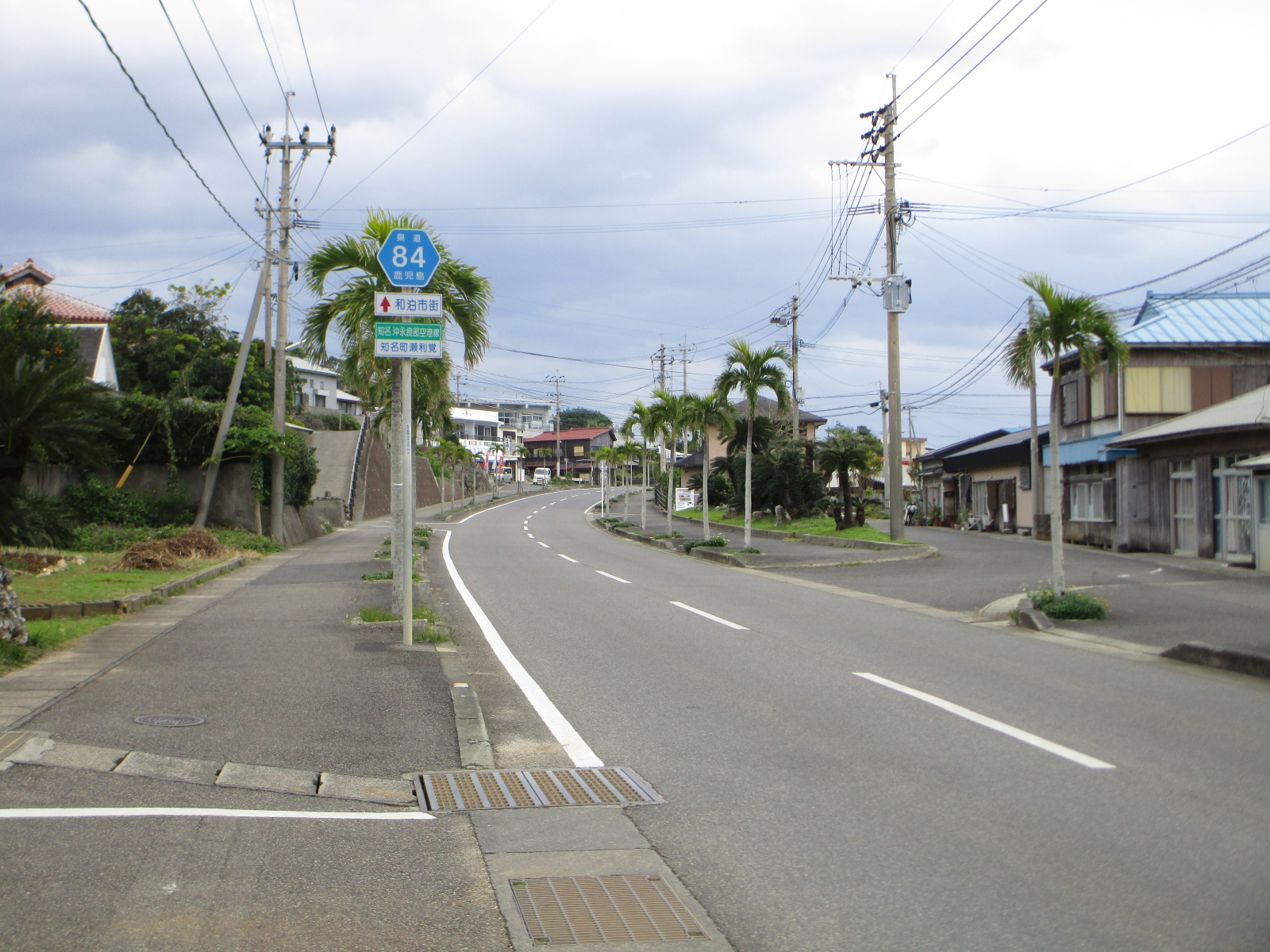 鹿児島県道84号知名沖永良部空港線（鹿児島県大島郡知名町瀬利覚より撮影）